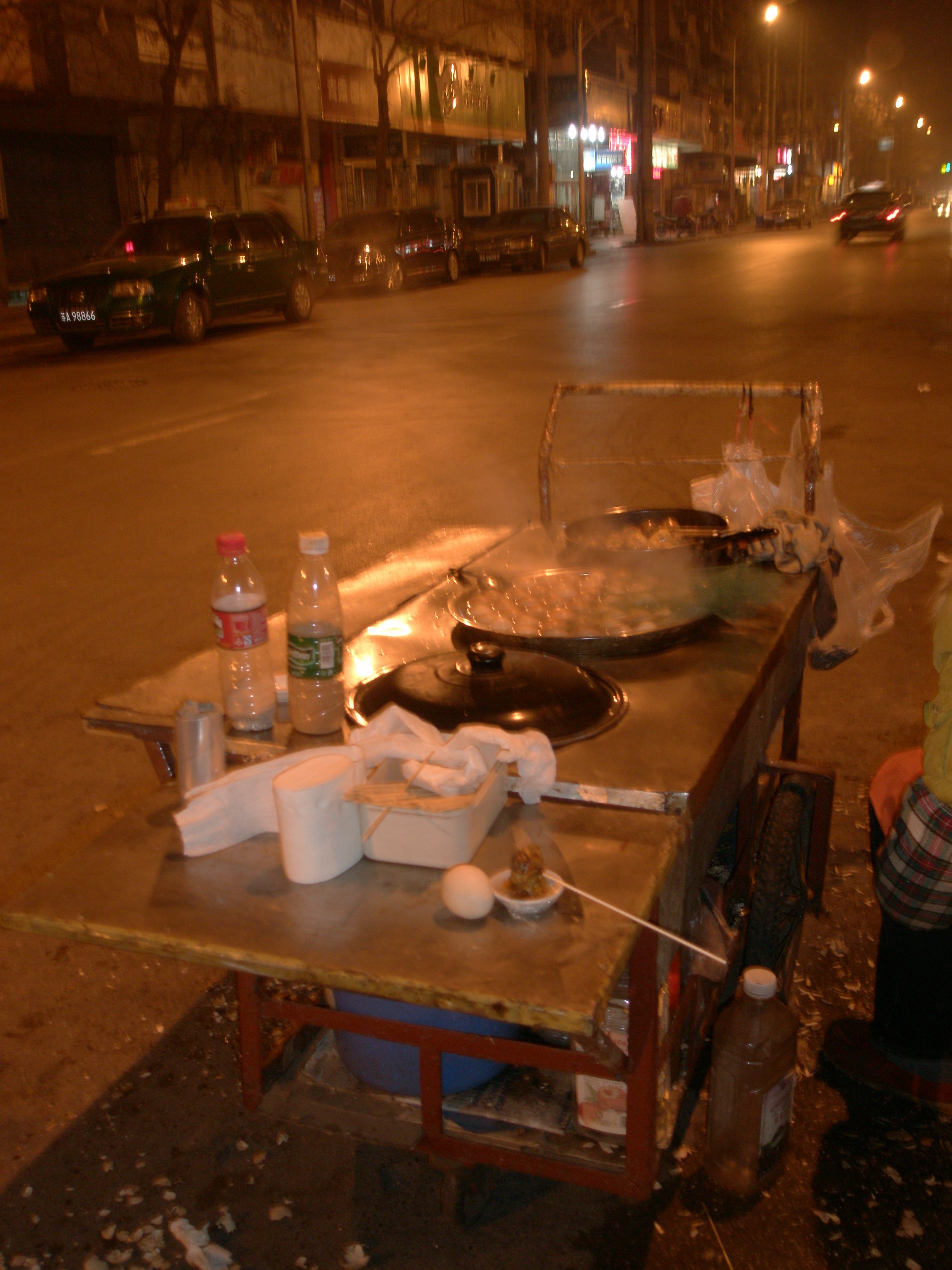 南京夜间，路边出售旺鸡蛋的小推车